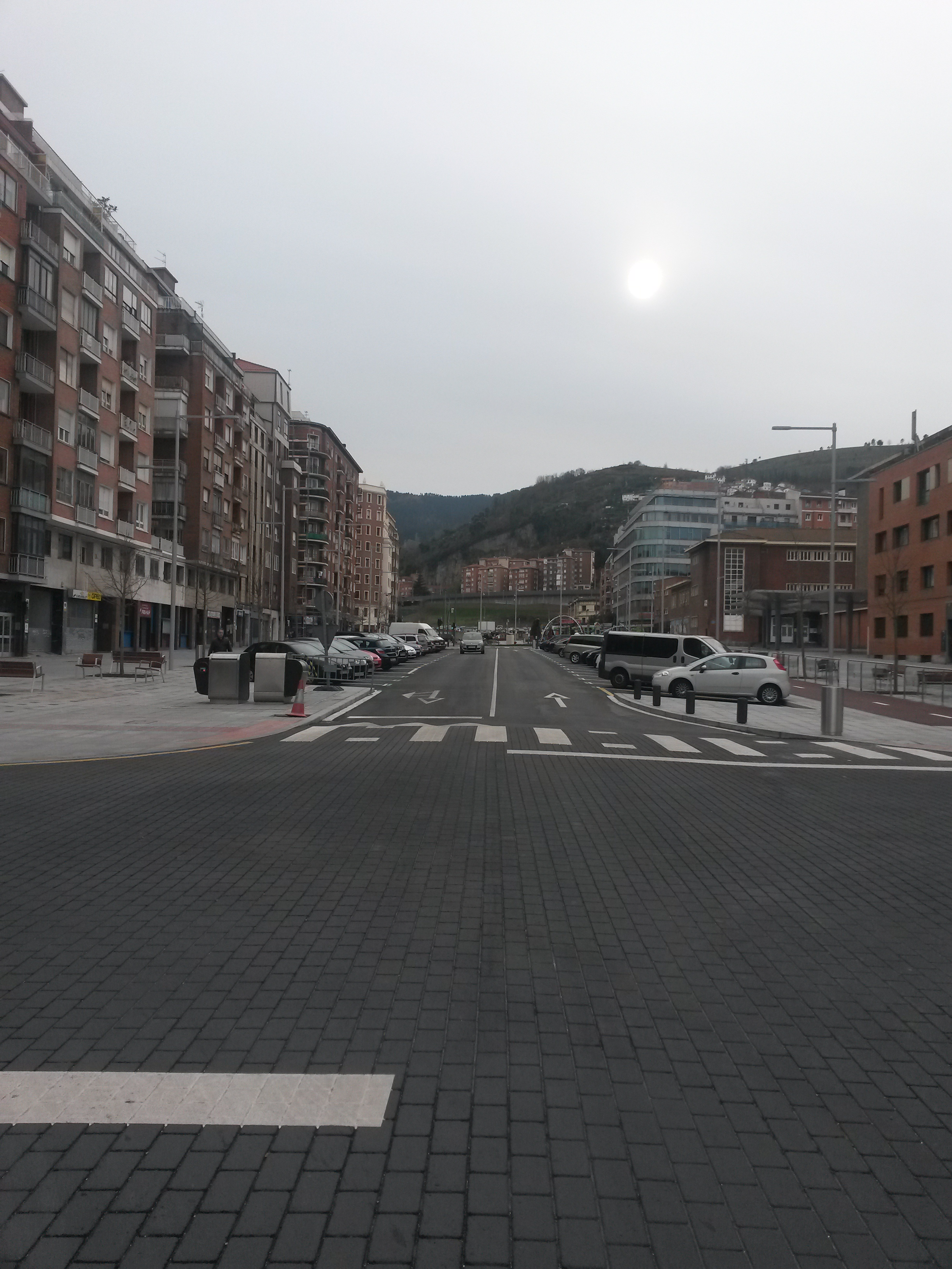 Avenida Sabino Arana.